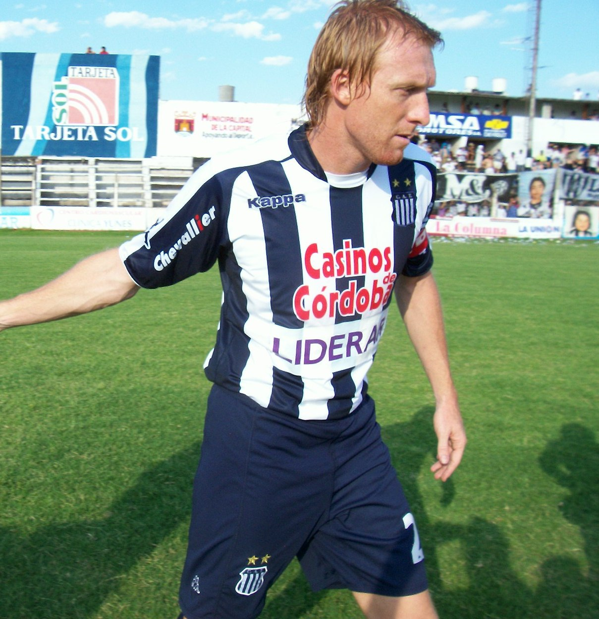 Fotografía de Federico Lussenhoff en la previa del partido entre Central Córdoba de Santiago del Estero y Talleres de Córdoba